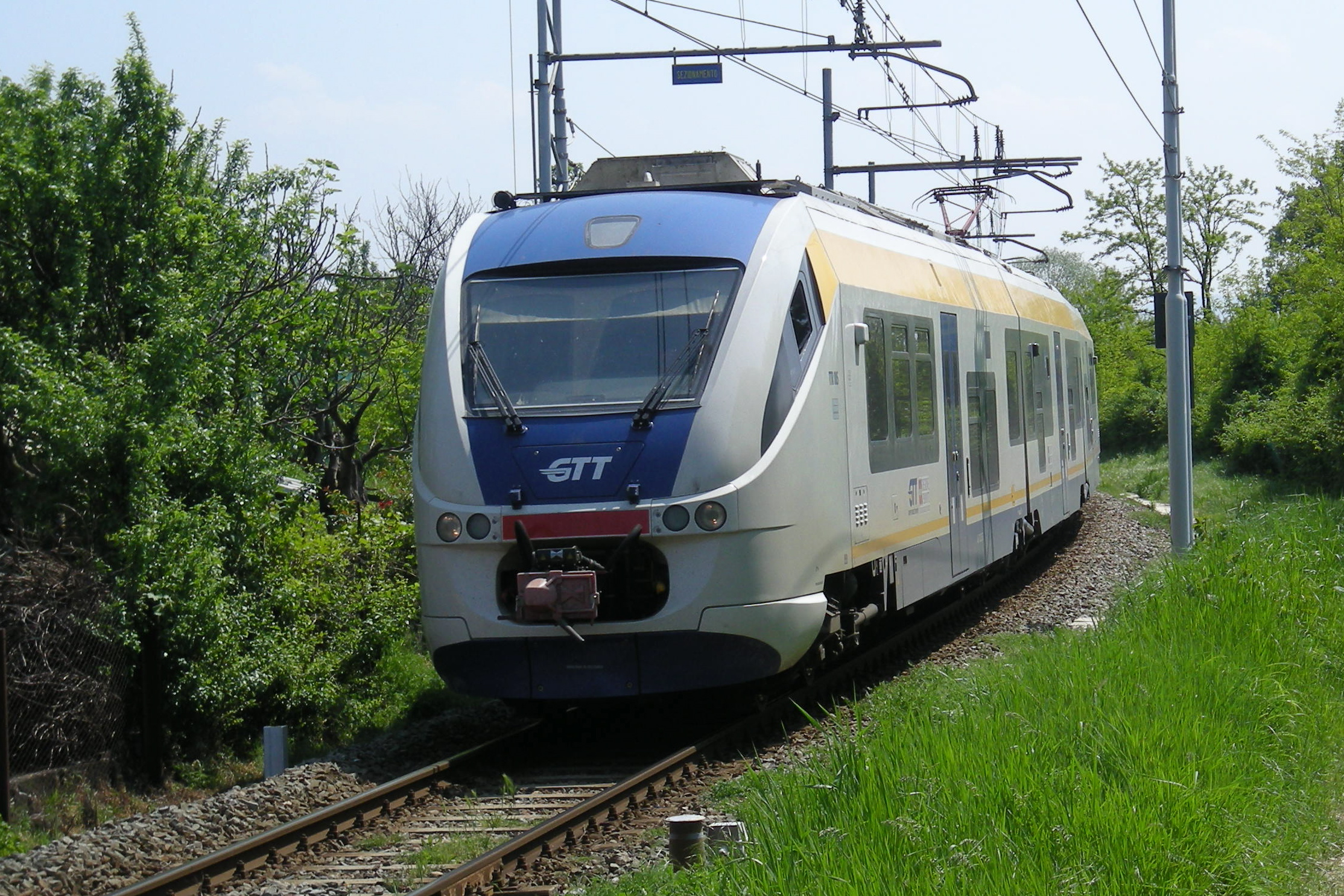 Alstom TTR sulla Ferrovia del Canavese